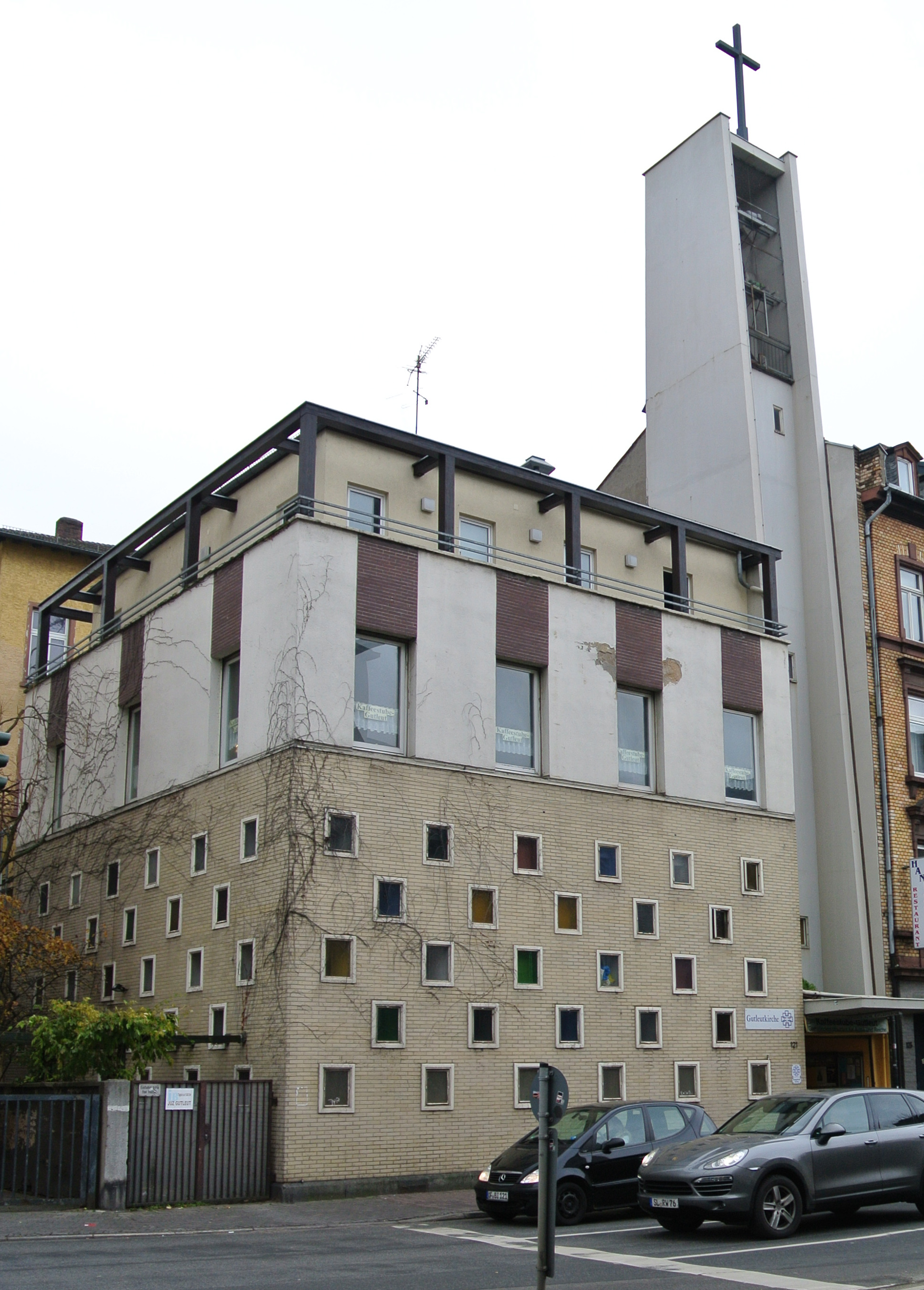 Evangelische Gutleutkirche im Frankfurter Gutleutviertel des Architekten Rudolf Schanty aus dem Jahr 1958 zur evangelischen Hoffnungsgemeinde gehörend